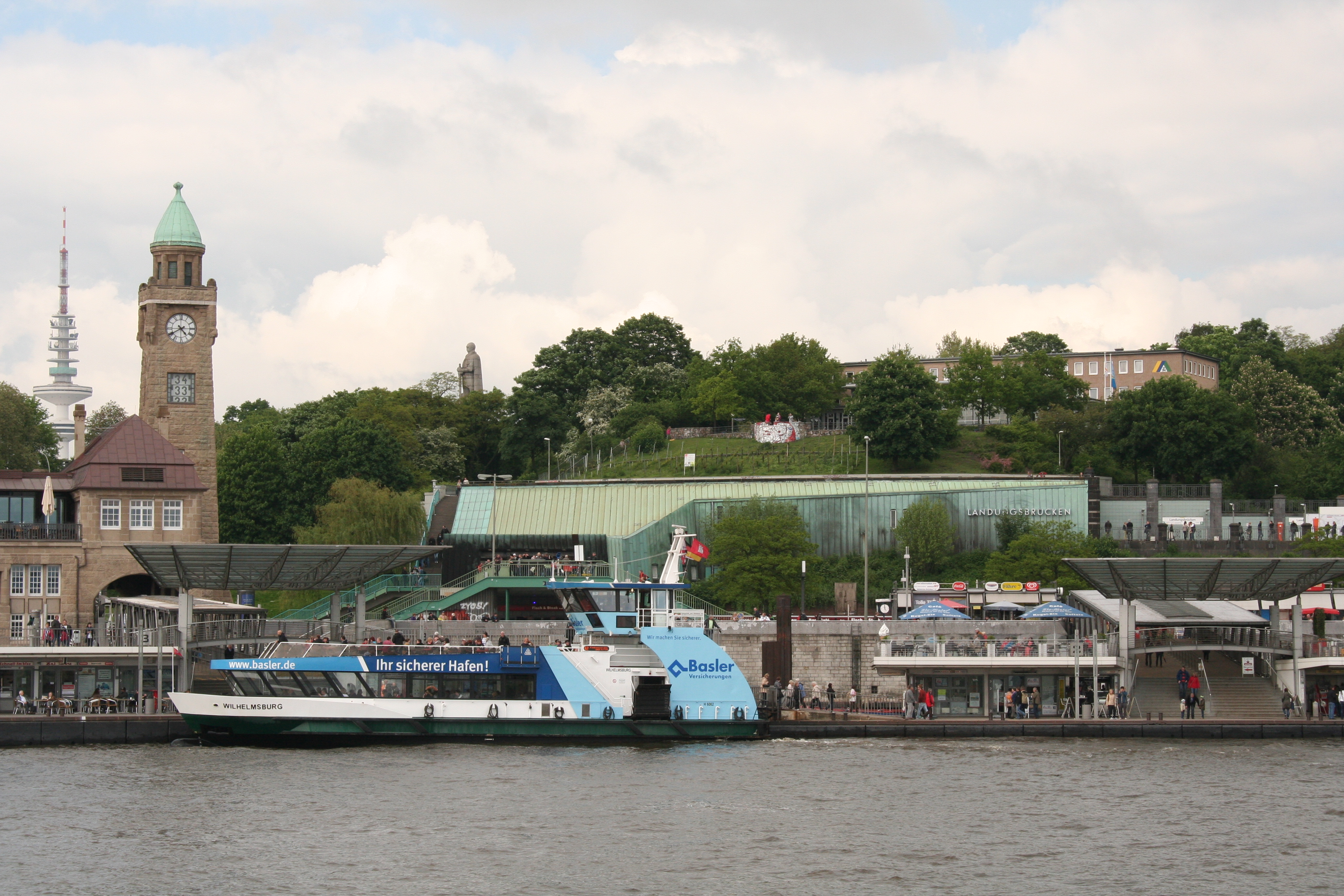 Der Hamburger Stintfang mit Heinrich-Hertz-Turm, St. Pauli Landungsbrücken, Otto-von-Bismarck-Statue und Weinberg.